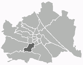 Positionskarte des 12. Wiener Gemeindebezirks Unter Verwendung einer Vorlage von Extrawurst. Public Domain.